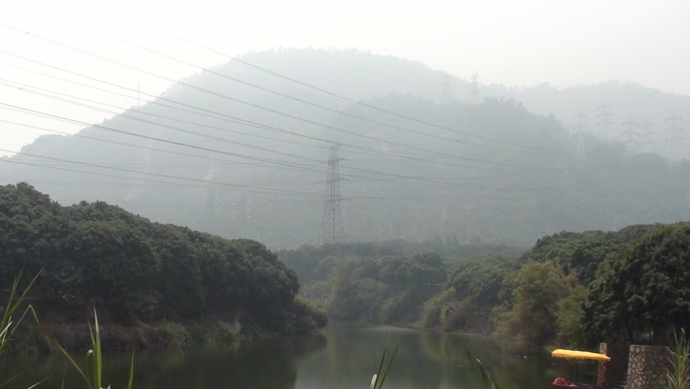 深圳大南山